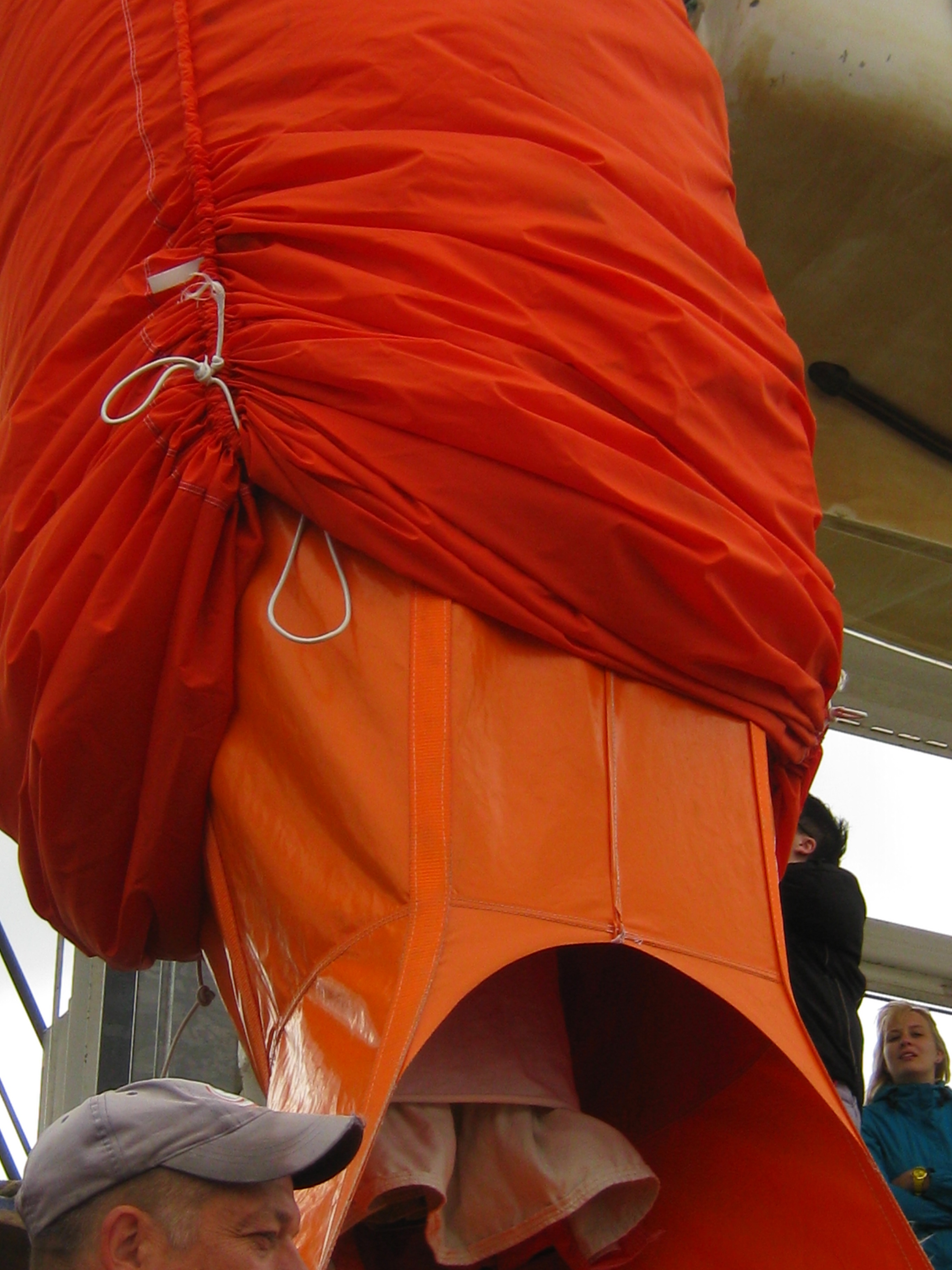 unteres Ende eines Rettungsschlauchs für Schiffe, Aus- und Fortbildungszentrum Rostock.